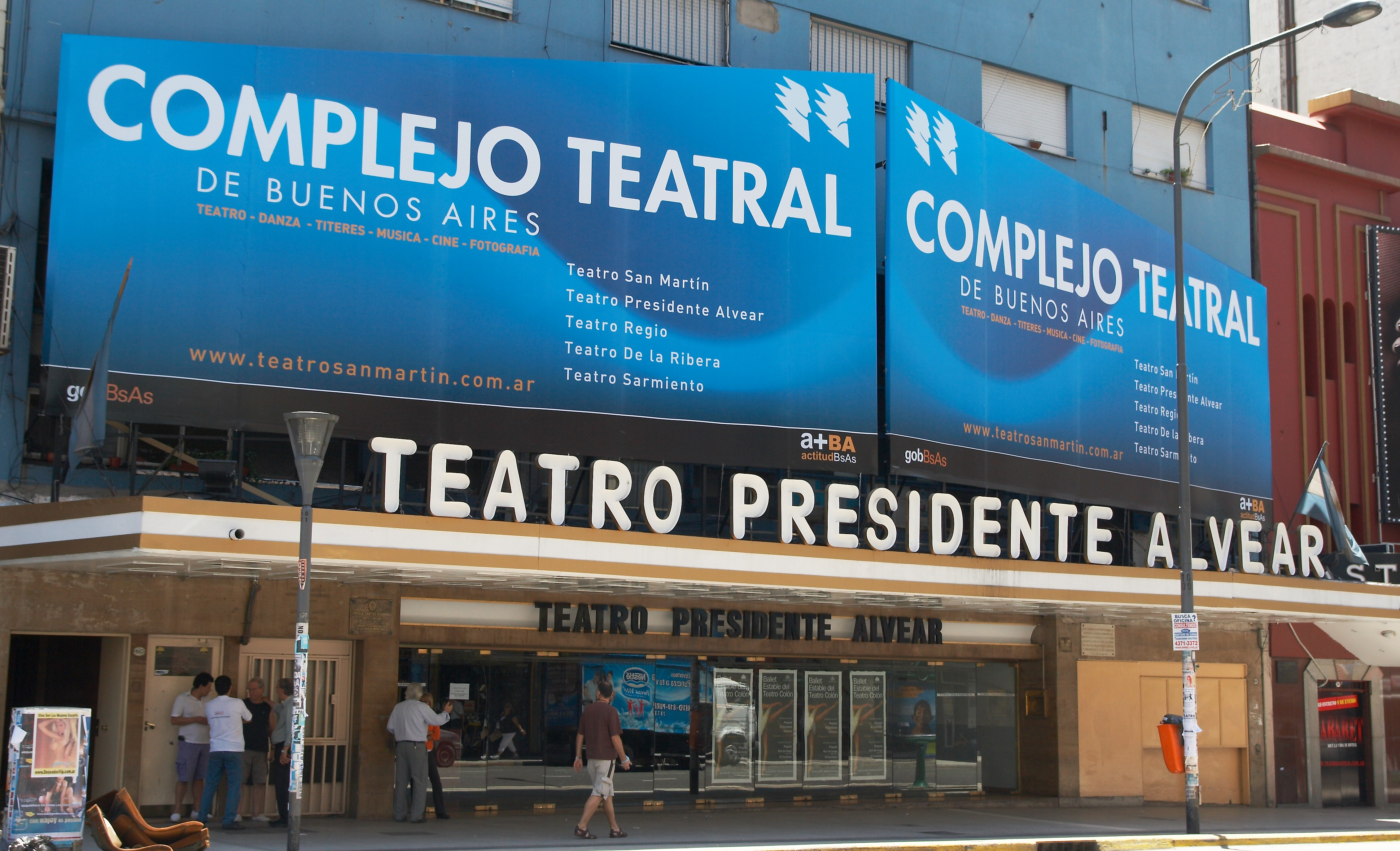 Teatro Presidente Alvear, Avenida Corrientes, barrio de San Nicolás, Buenos Aires, Argentina.